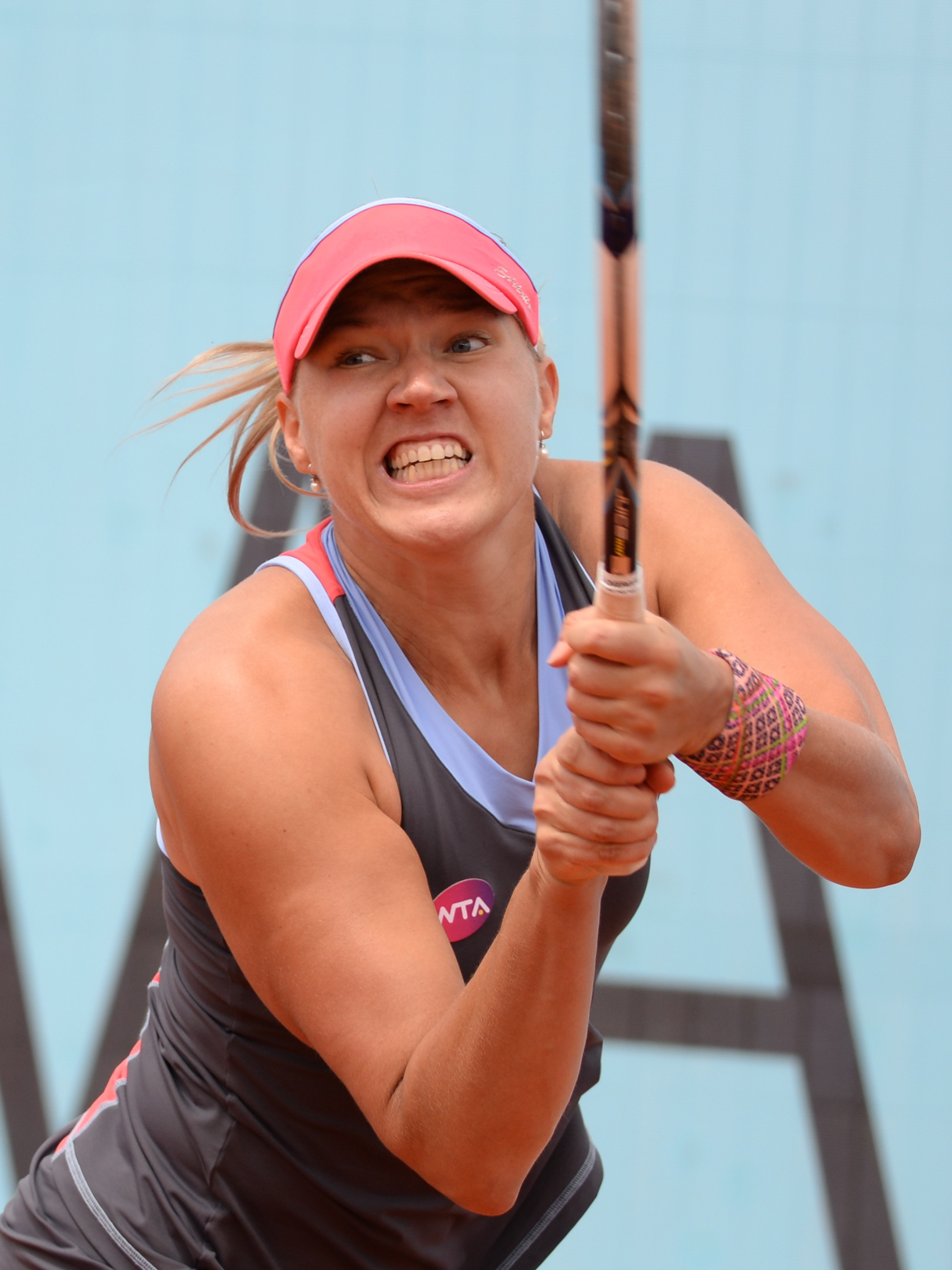 Kaia Kanepi